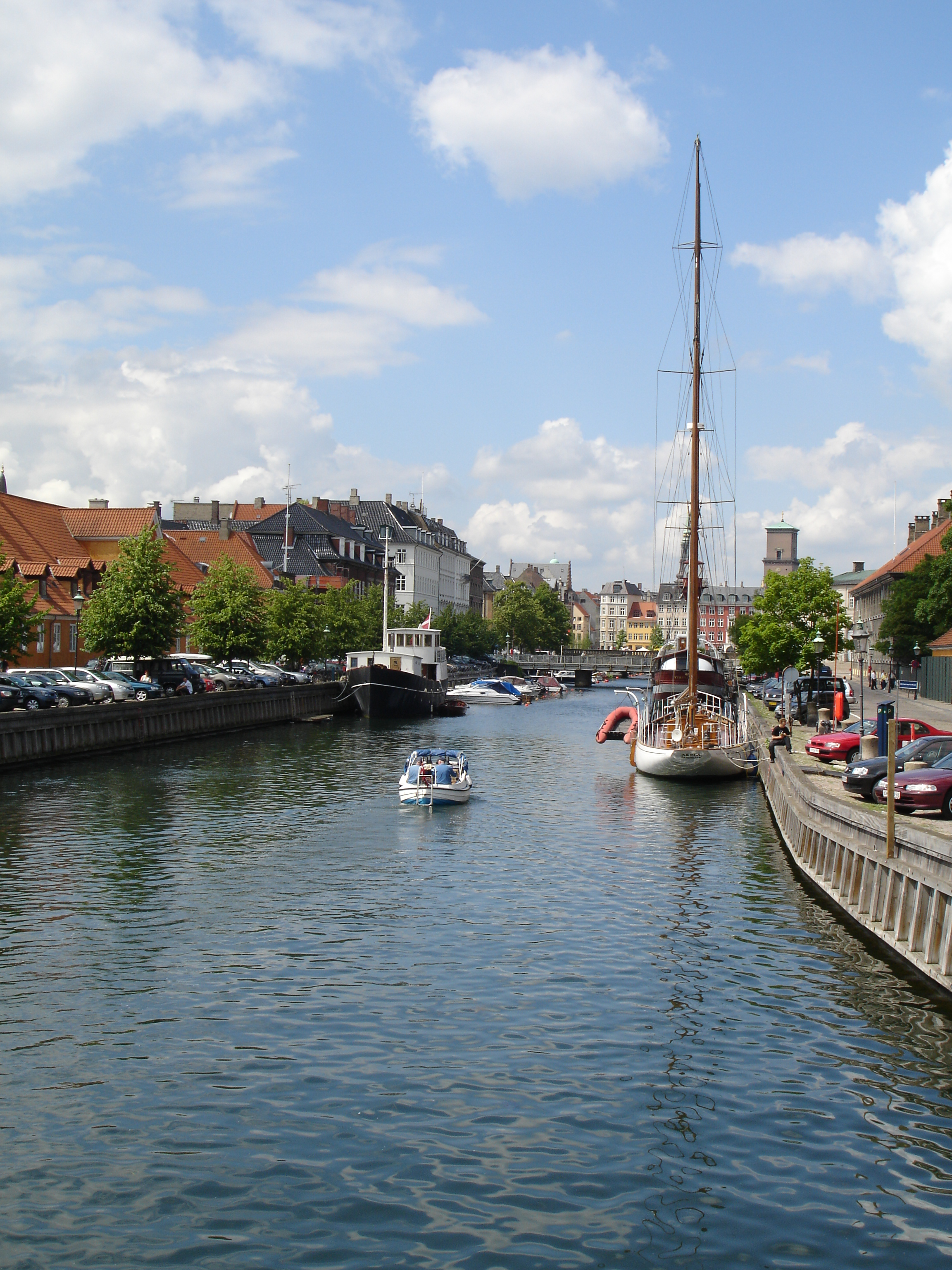 Frederiksholms Kanal in Copenhagen, Denmark